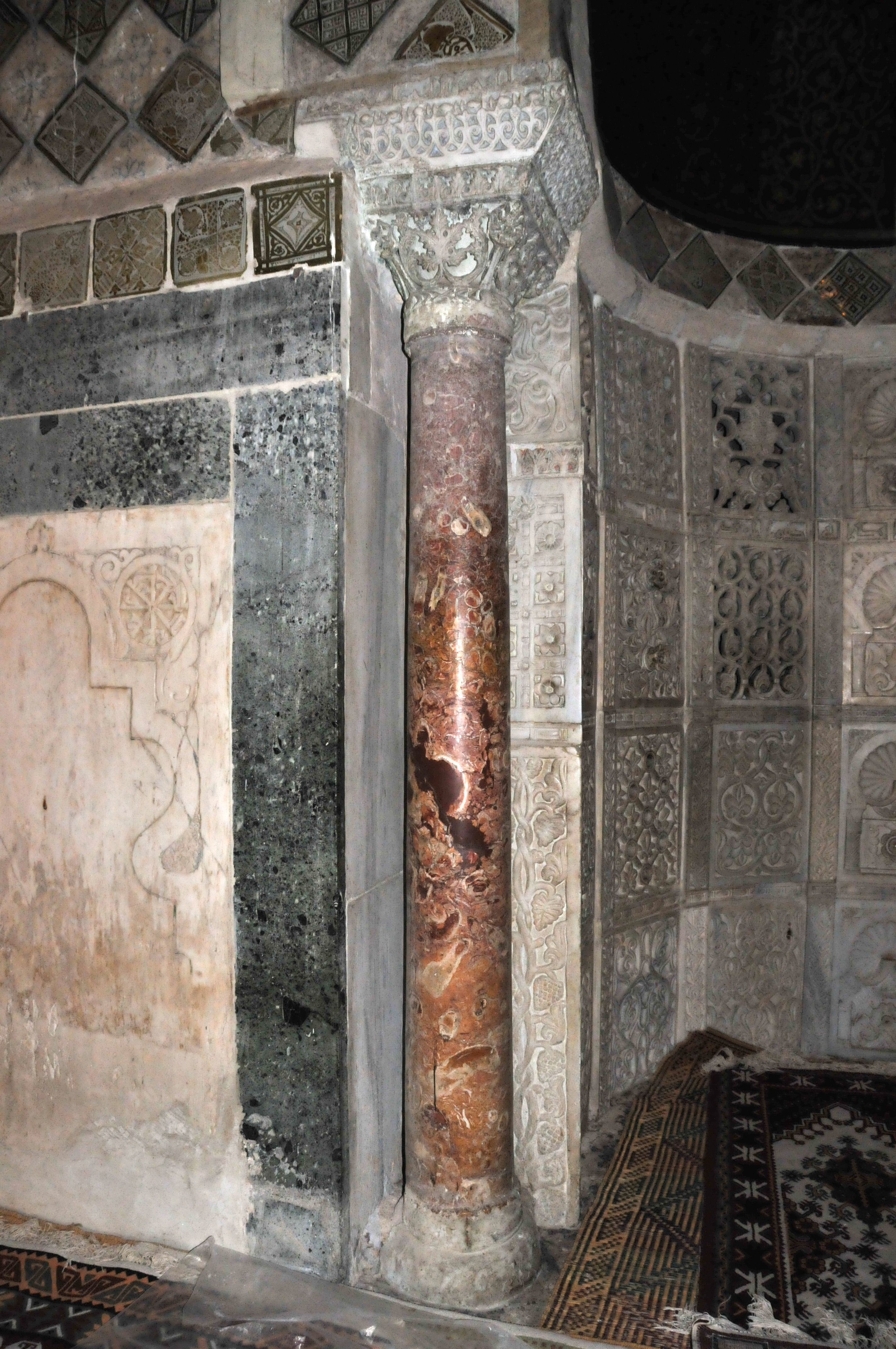 L'une des deux colonnes du mihrab dans la salle de prière de la Grande Mosquée de Kairouan, en Tunisie.